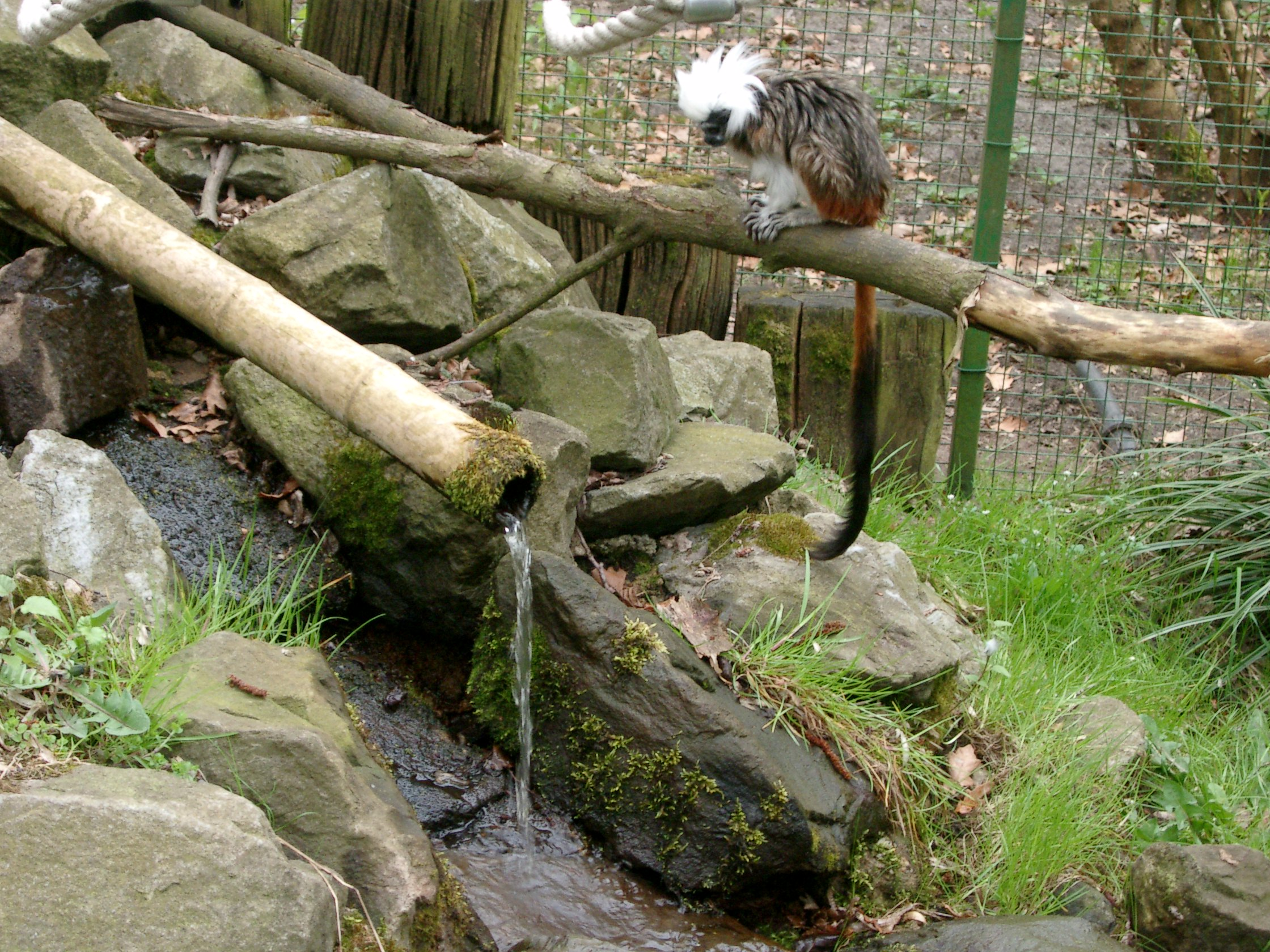 Lisztaffe im Serengeti-Park